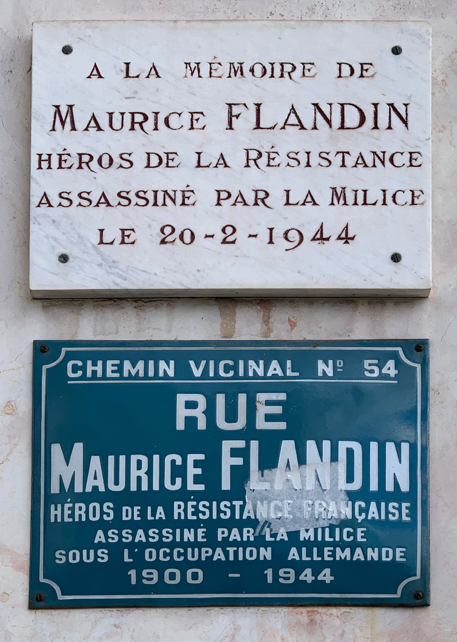 Plaque en hommage à Maurice Flandin et plaque de la rue Maurice Flandin, à Lyon France.